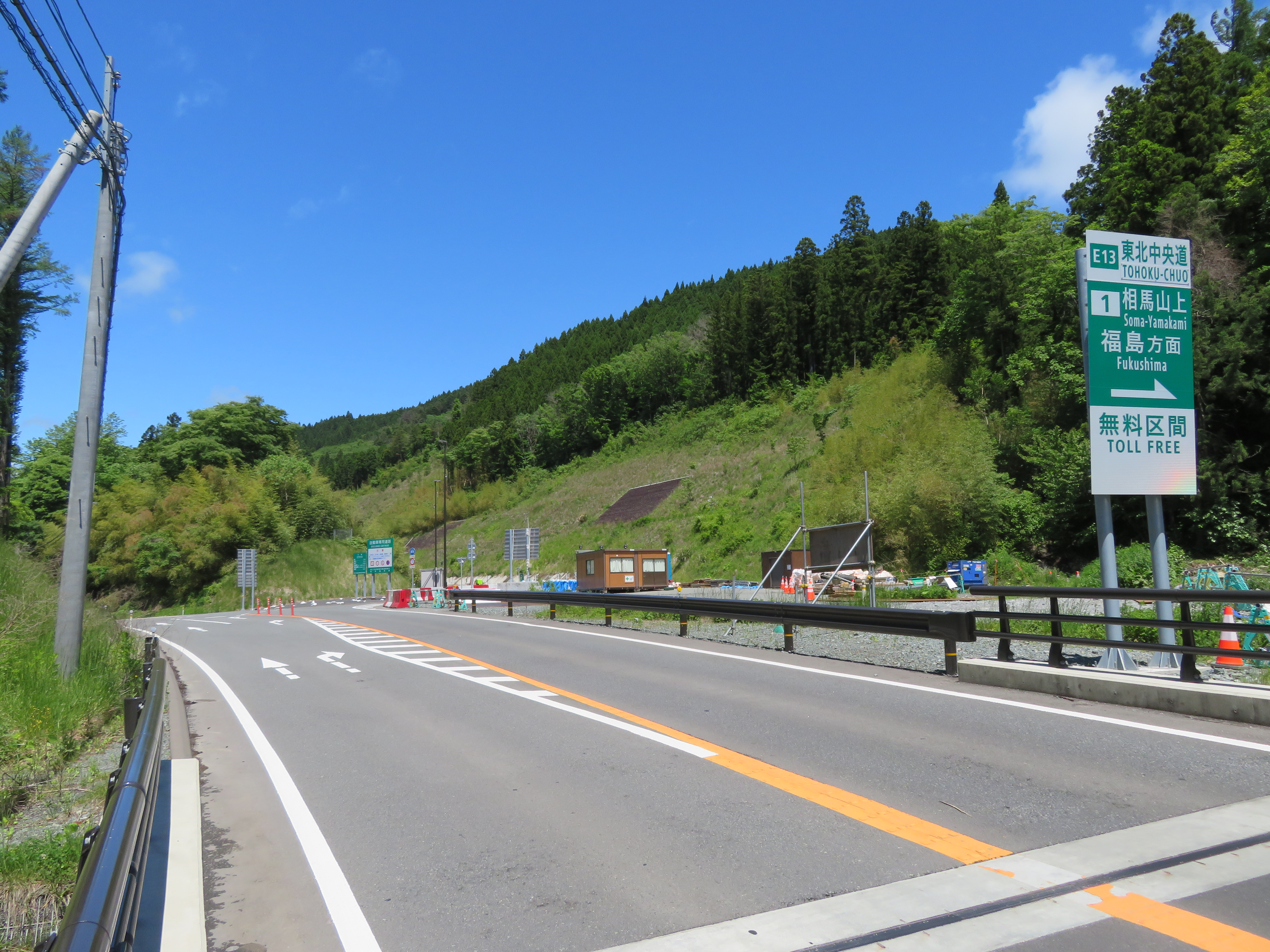 東北中央自動車道相馬山上インターチェンジ出入口付近（国道115号線から撮影） Canon PowerShot SX720 HS